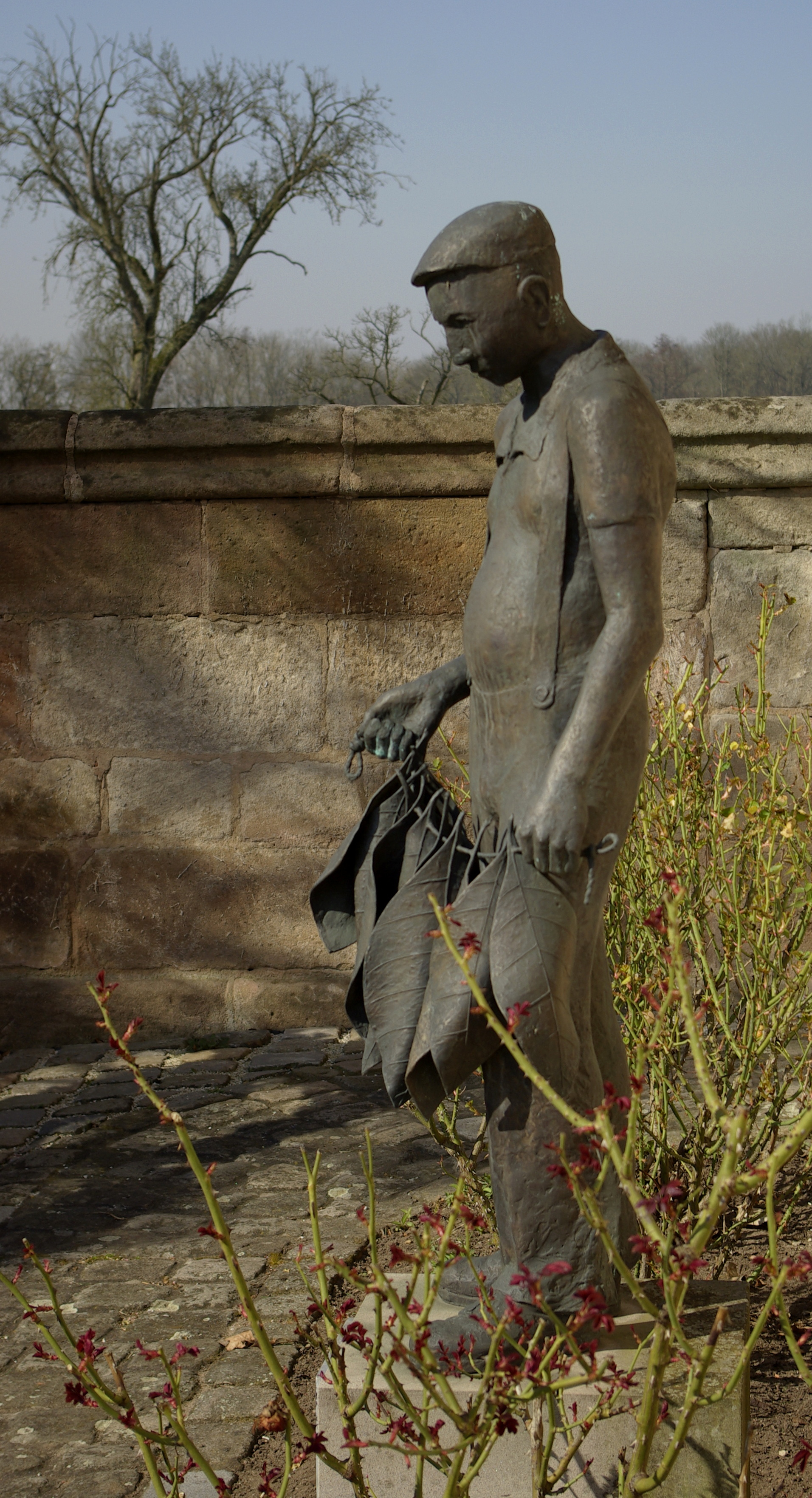 Denkmal „Zur Erinnerung an den ersten Tabakanbau ANNO 1670“ vor dem Haus Großgründlacher Hauptstraße 47 im Nürnberger Stadtteil Großgründlach